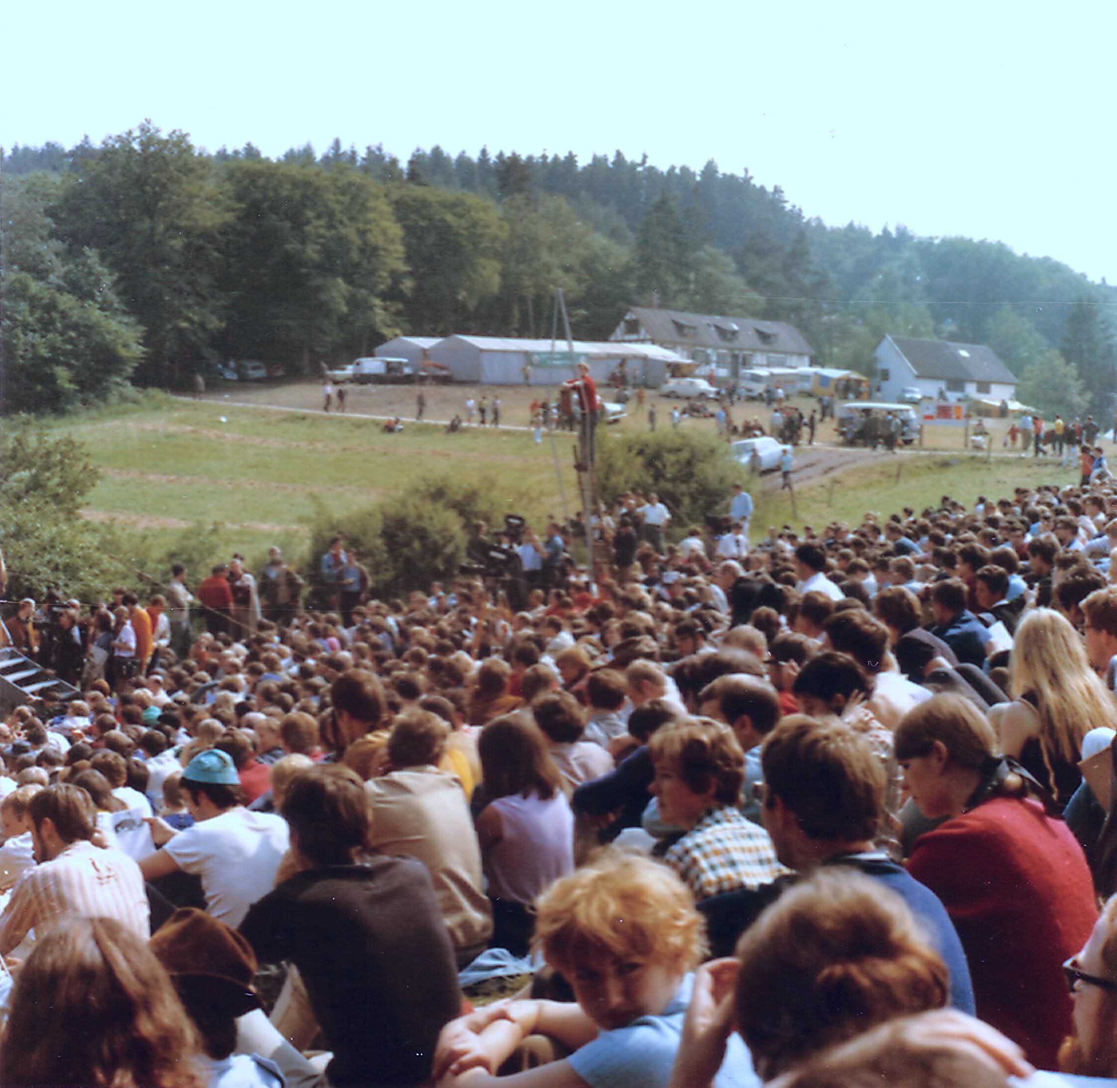 Publikum beim Burg Waldeck Festival 1968